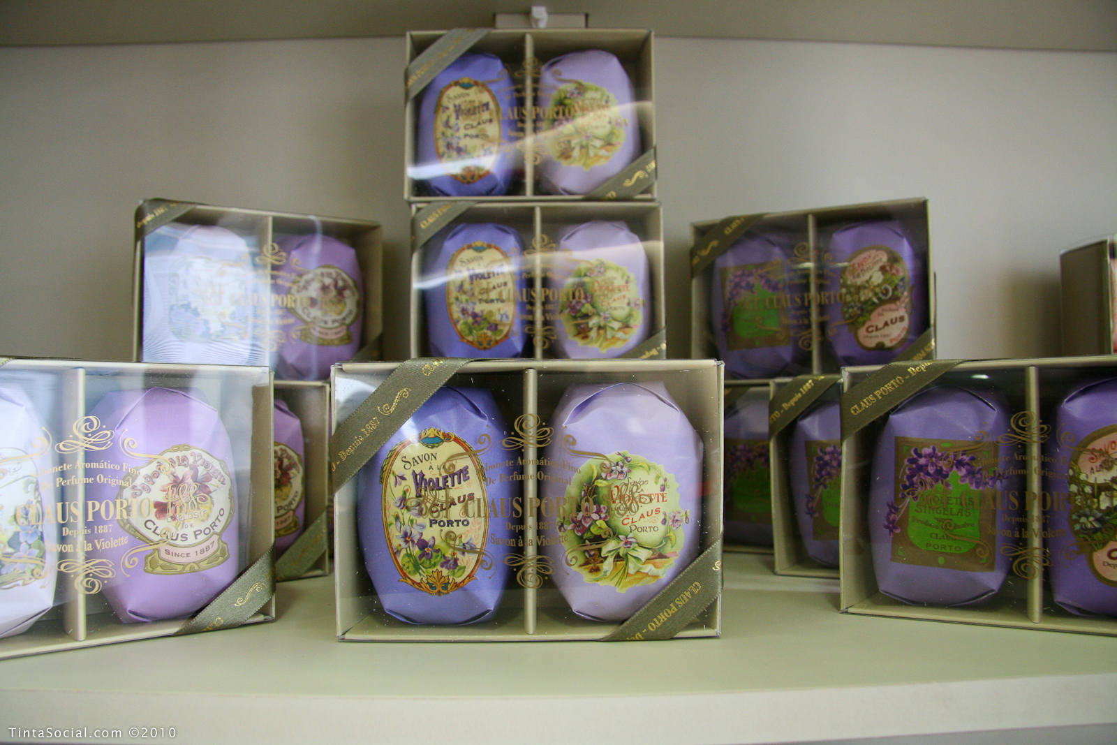 Loja À Antiga Portuguesa Rua da Saudade, nº. 2 2750-482 Cascais Portugal by:Tinta Social 2010